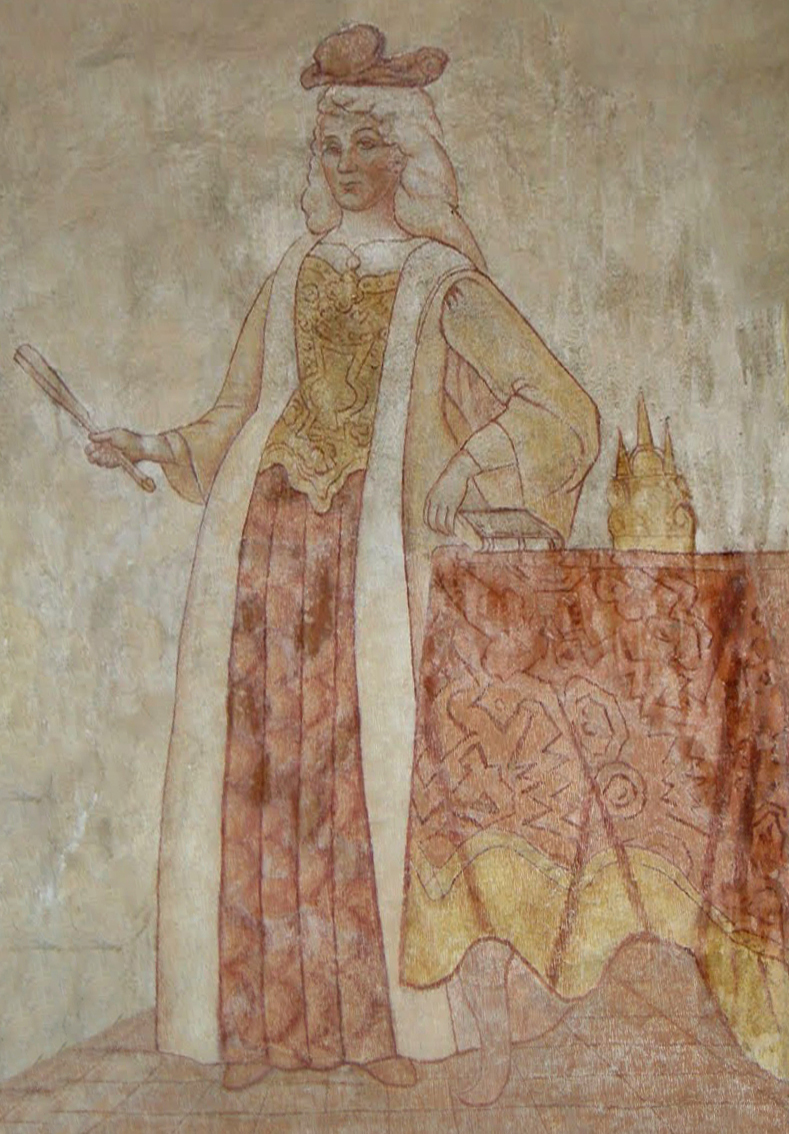 Беларуская (тарашкевіца): Партрэт Марцыбэлы Агінскай (Aginski) з Глябовічаў (Hlabovič)